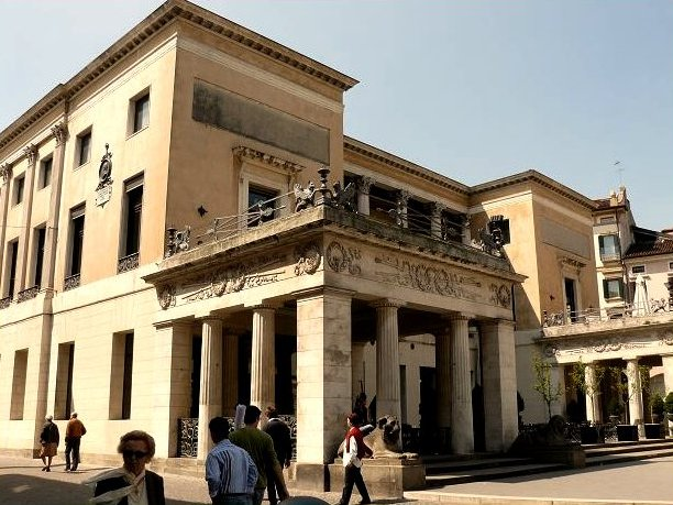 Caffè Pedrocchi in Padova - Italia.